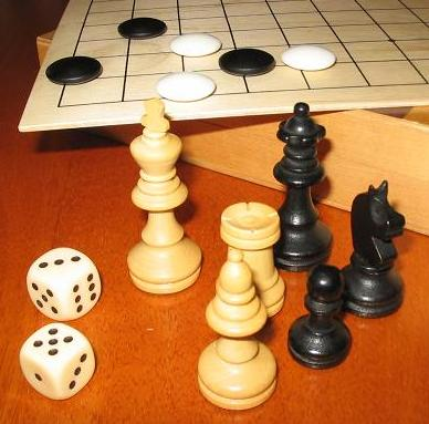 Versuch, den Begriff "Spiel" als Bild darzustellen